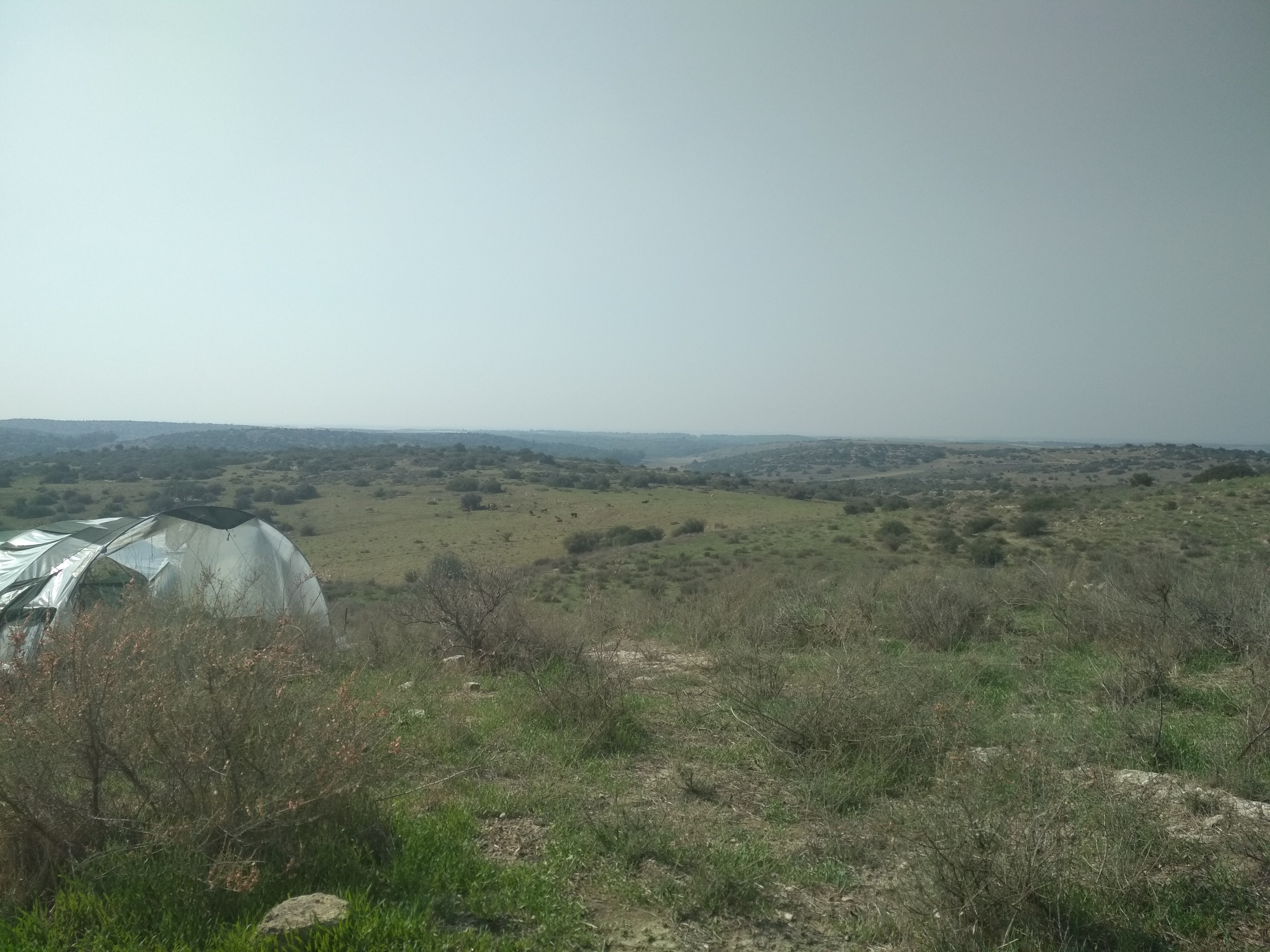 מהתל ישנה טבעת מערות (פרברי התל) שבו מתבצעות חפירות כעת. צופה לכיוון הים